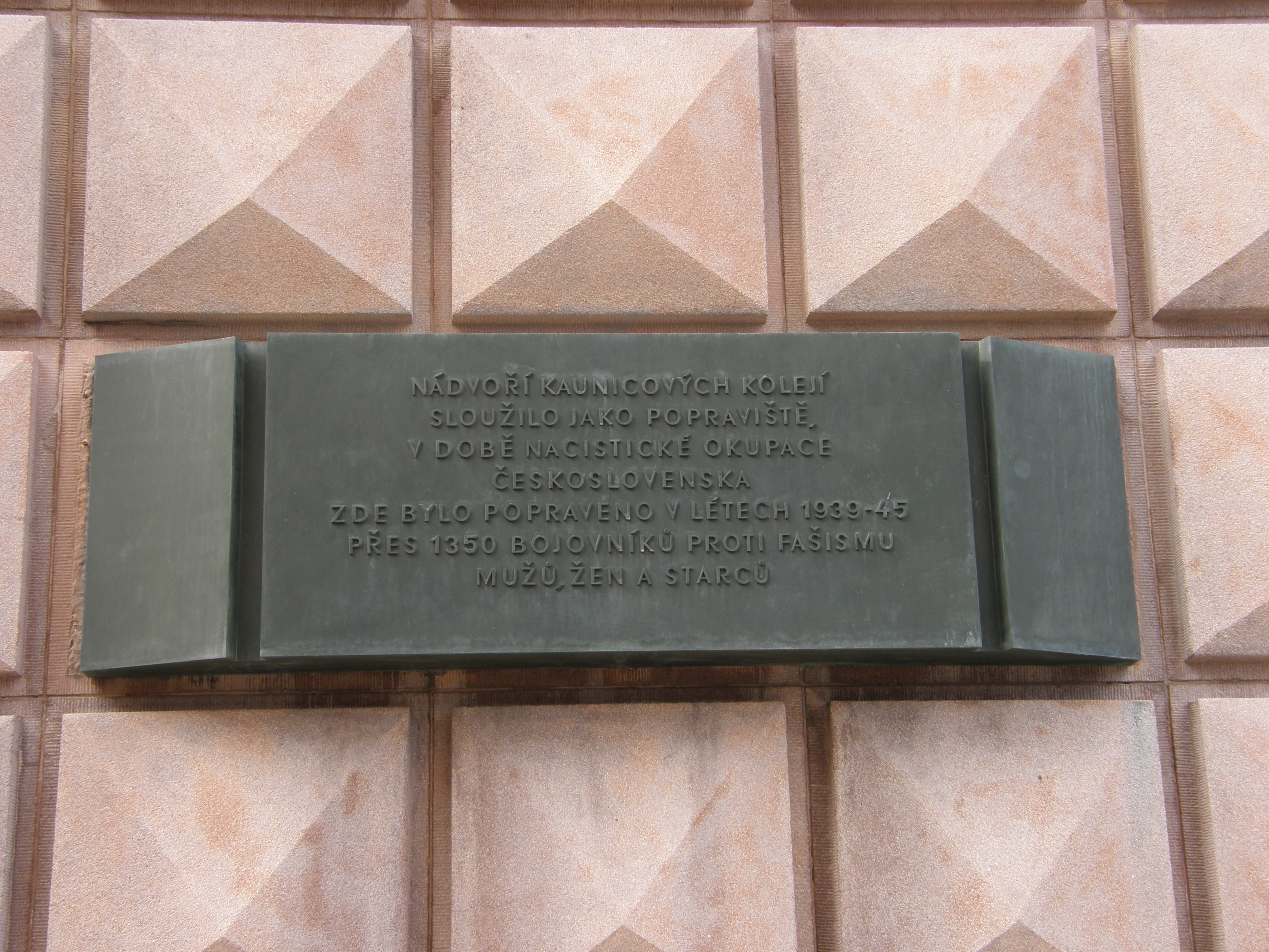 Pamatník na Kounicových kolejích